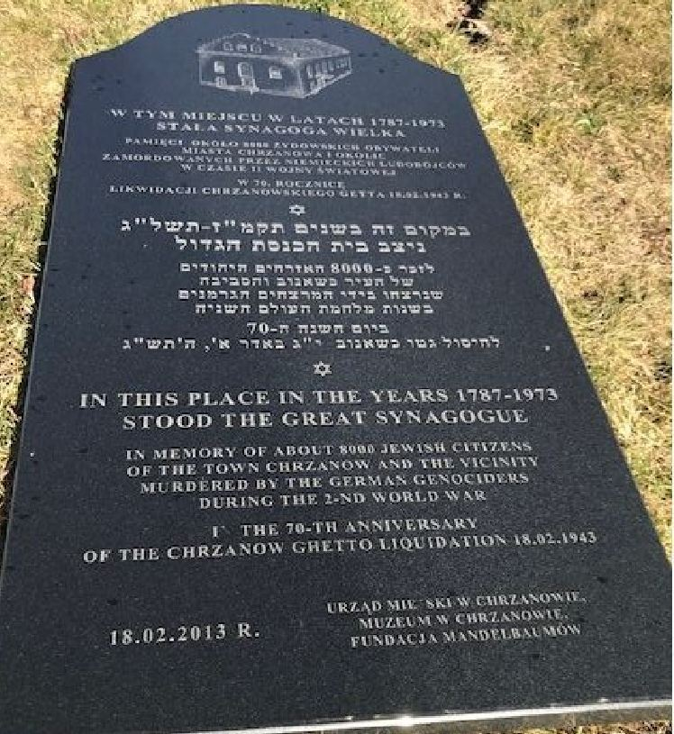 כשאנוב, לוח-זיכרון לתושביה היהודים שנספו בשואה (צילום ריכטר 2020, עריכה הולנדר)